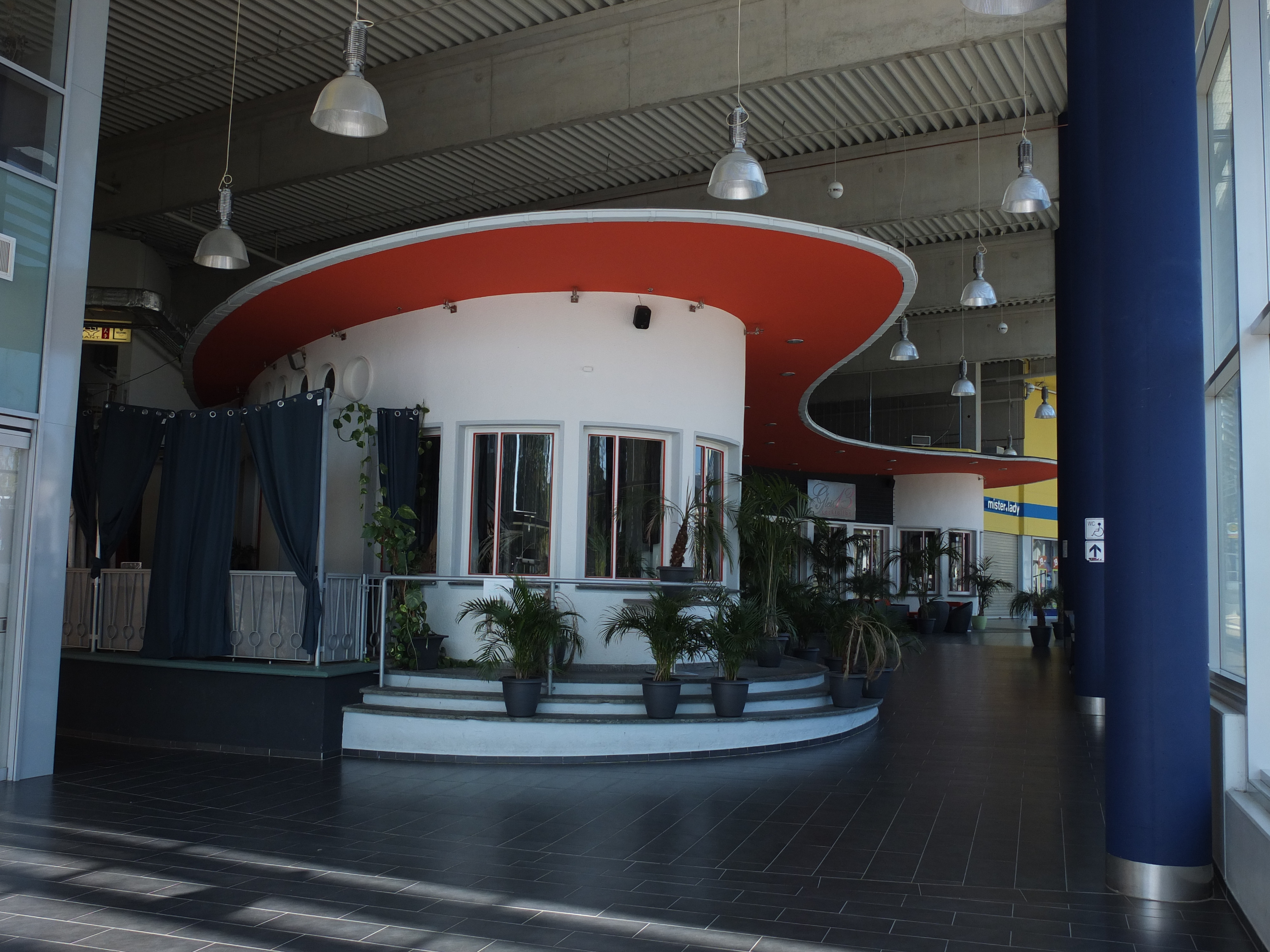 Ehemalige Gaststätte „Am Kleinbahnhof“, Soest This is a photograph of an architectural monument.